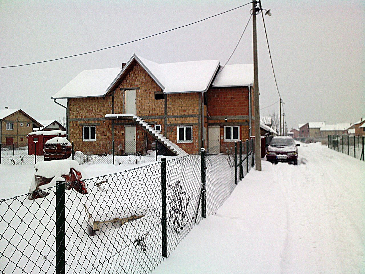 Ledine, Belgrade, Serbia